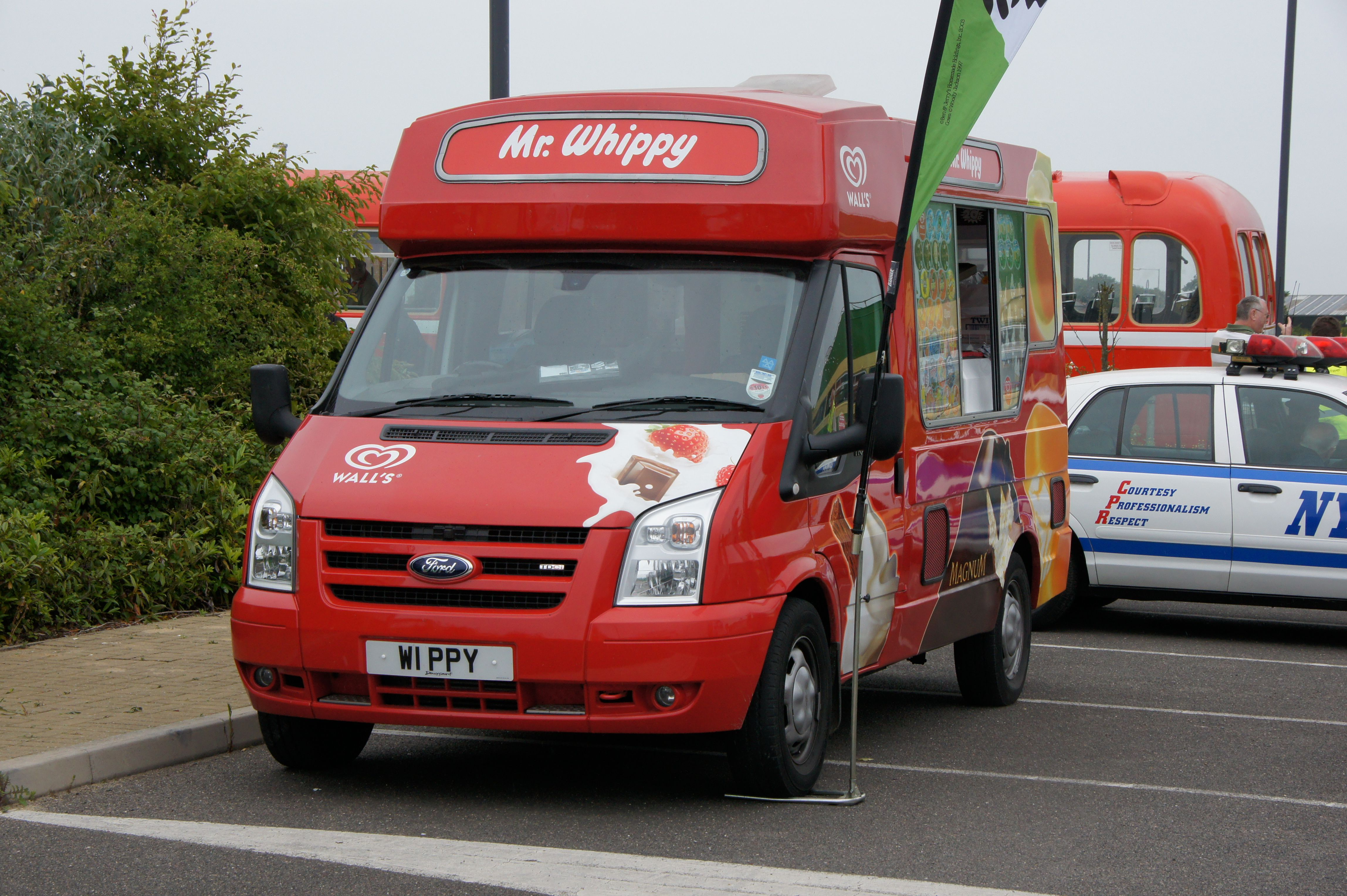 W1PPY 050611 CPS